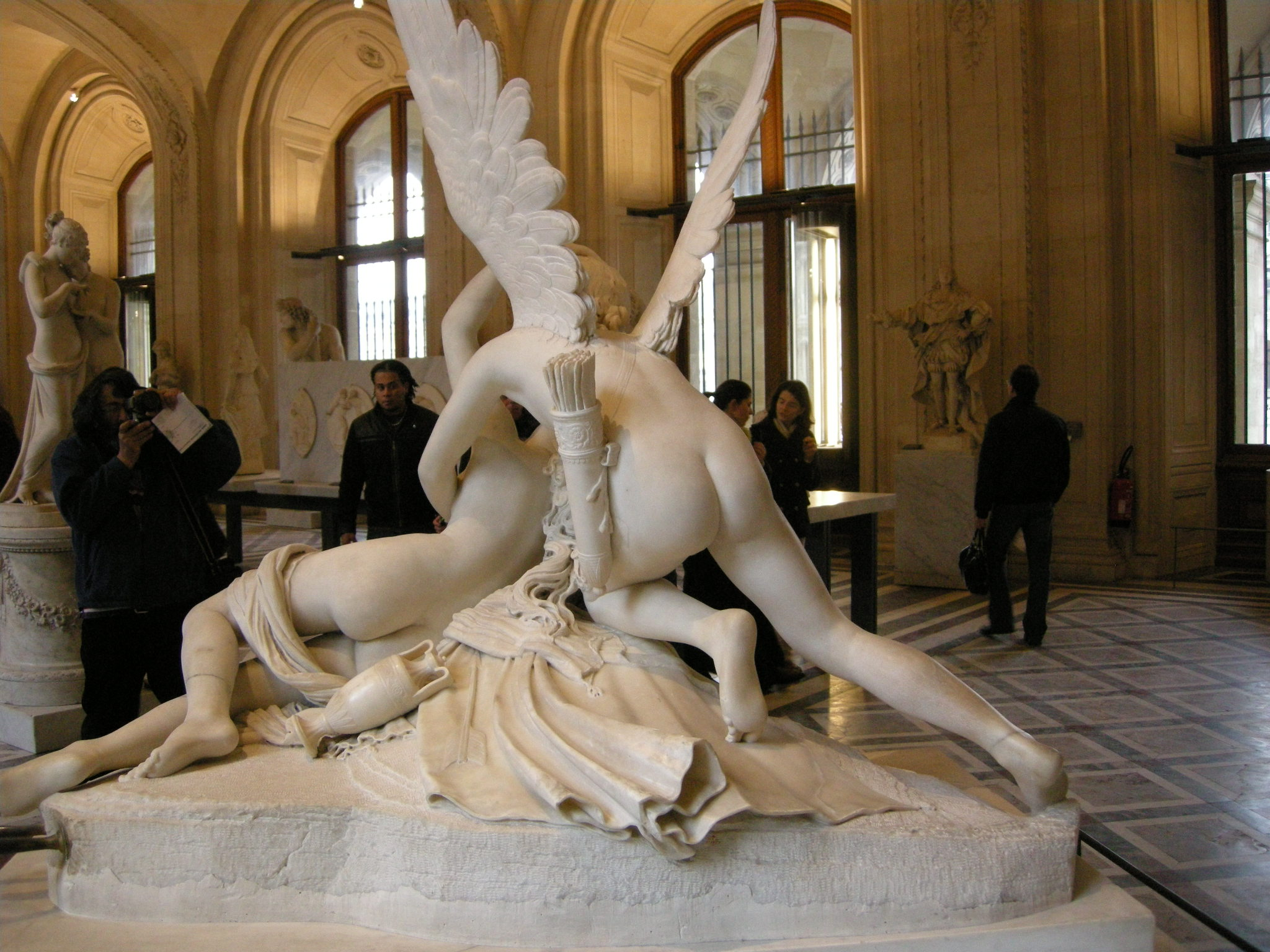 Antonio canova, amore e psiche louvre 06.JPG